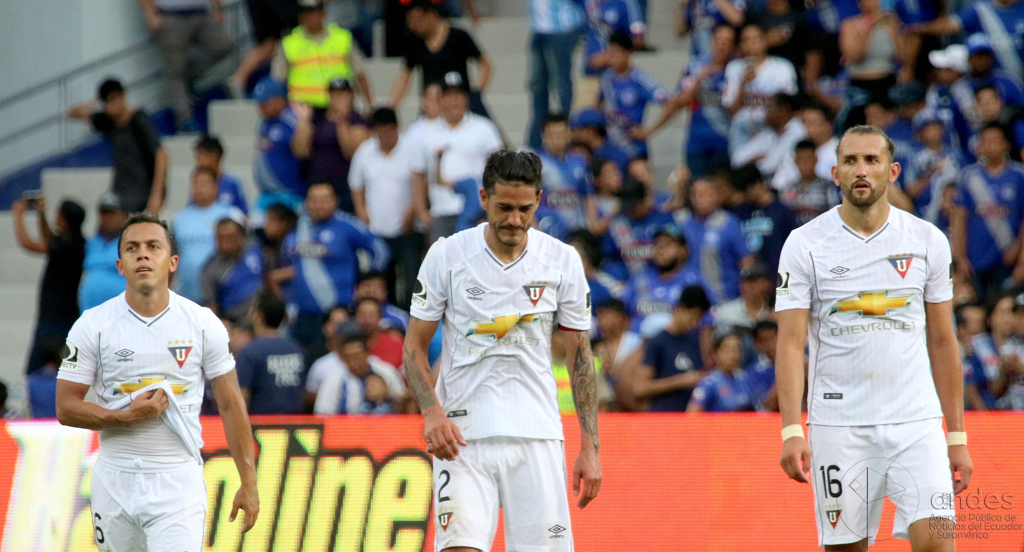 Guayaquil,domingo 12 de febrero del 2017 (Andes).-En el remodelado estadio Capwell, Emelec se enfrenta a Liga de Quito en la tercera fecha del campeonato ecuatoriano de fútbol. Foto:Andes/César Muñoz